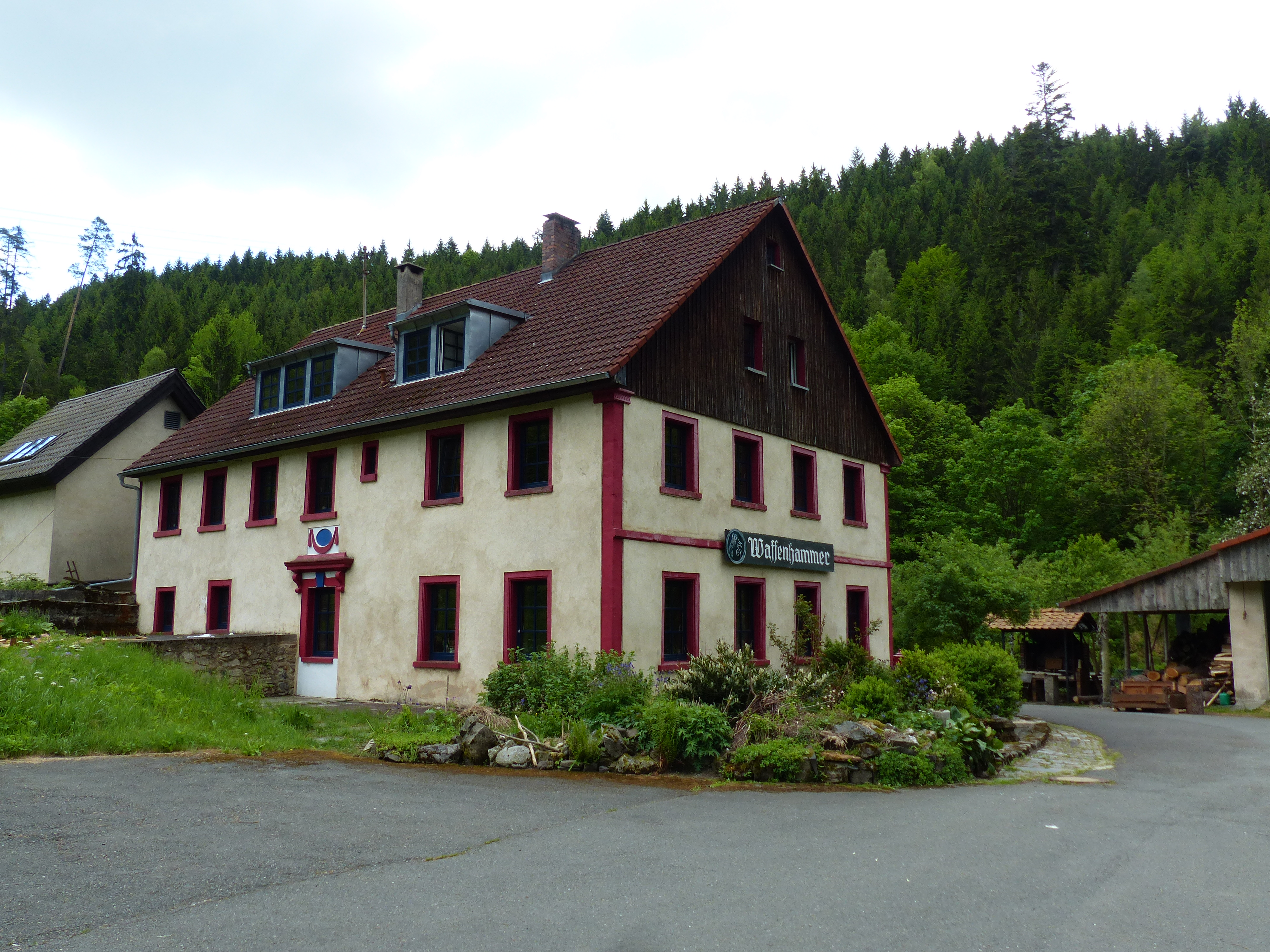 Ansichten des Ortsteils Waffenhammer